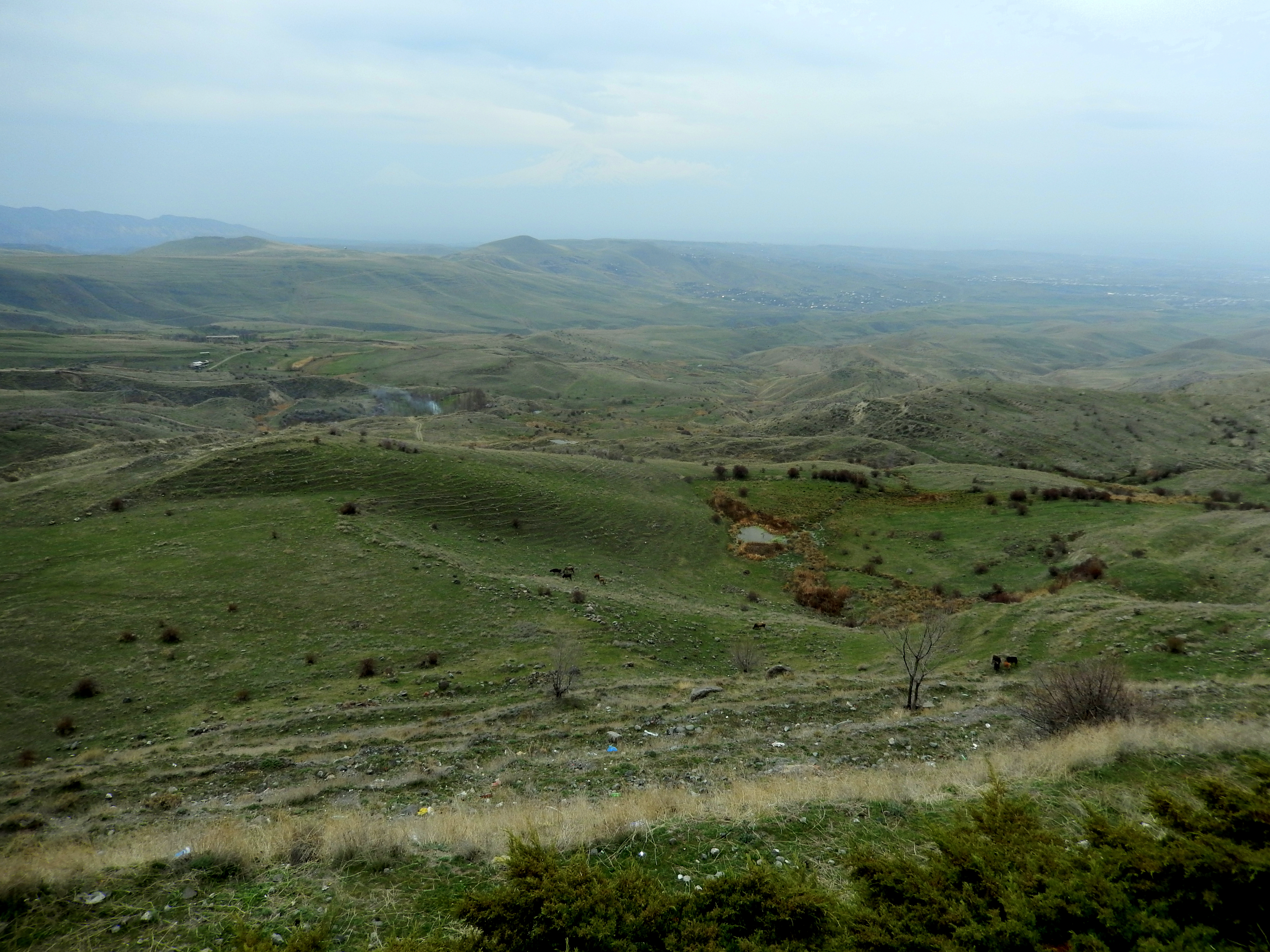 «Ողջաբերդ» բնապատմական համալիր